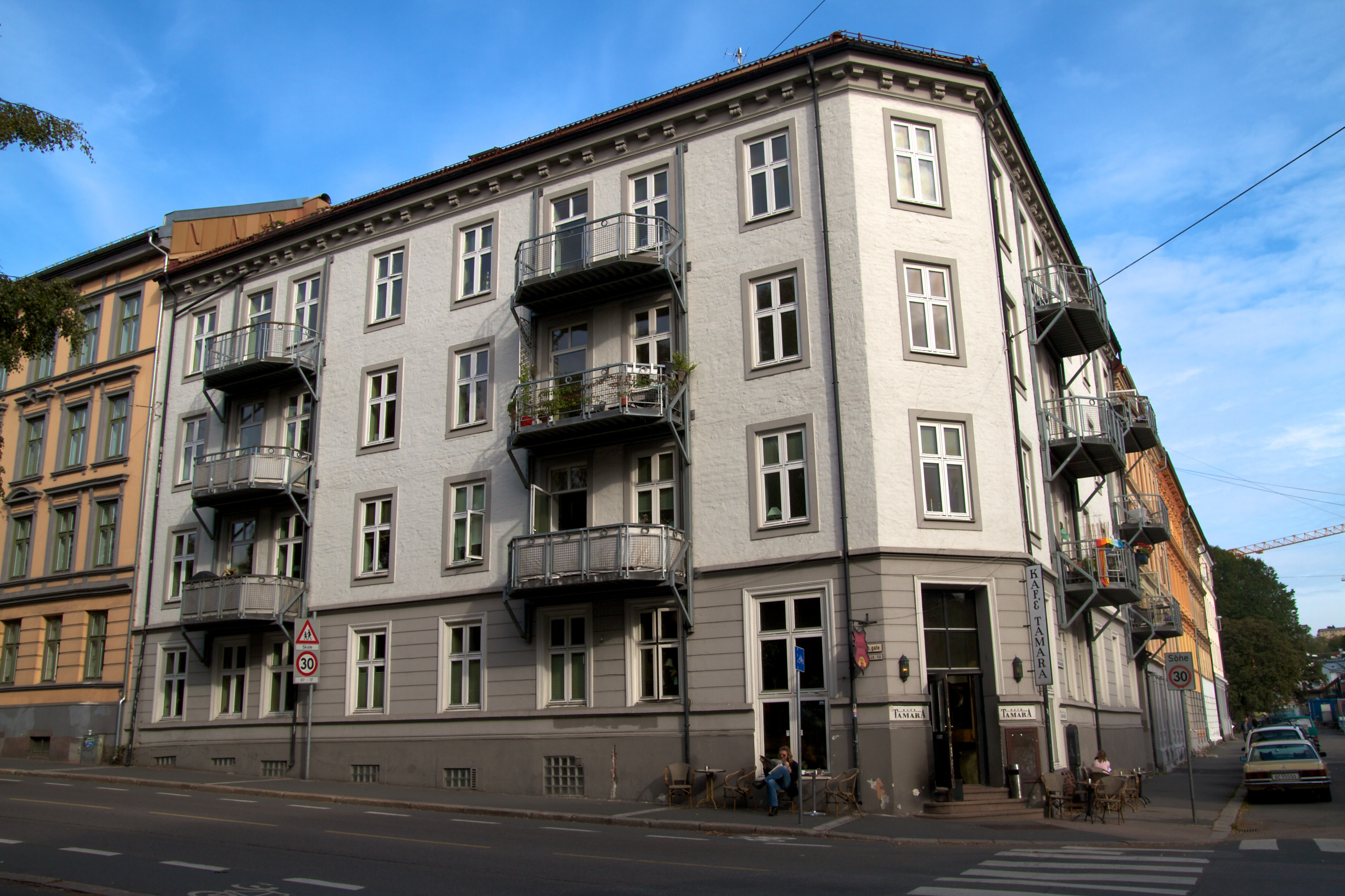 Toftes gate 50 i Oslo. Arkitekt: Rudolf Haeselich.